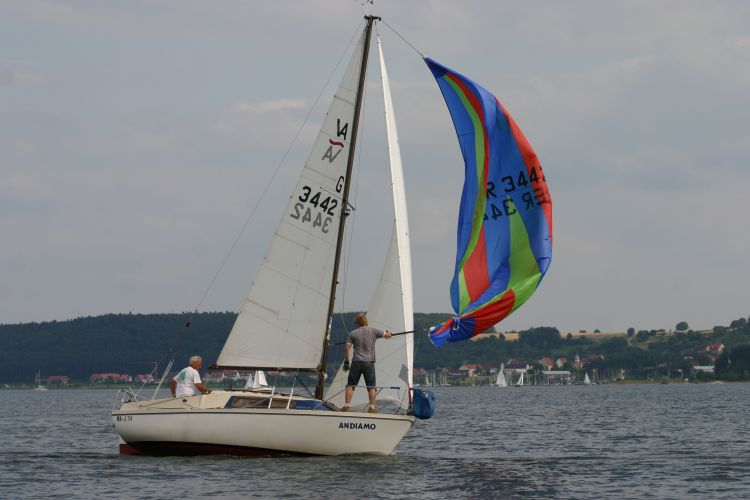 Varianta auf dem Großen Brombachsee